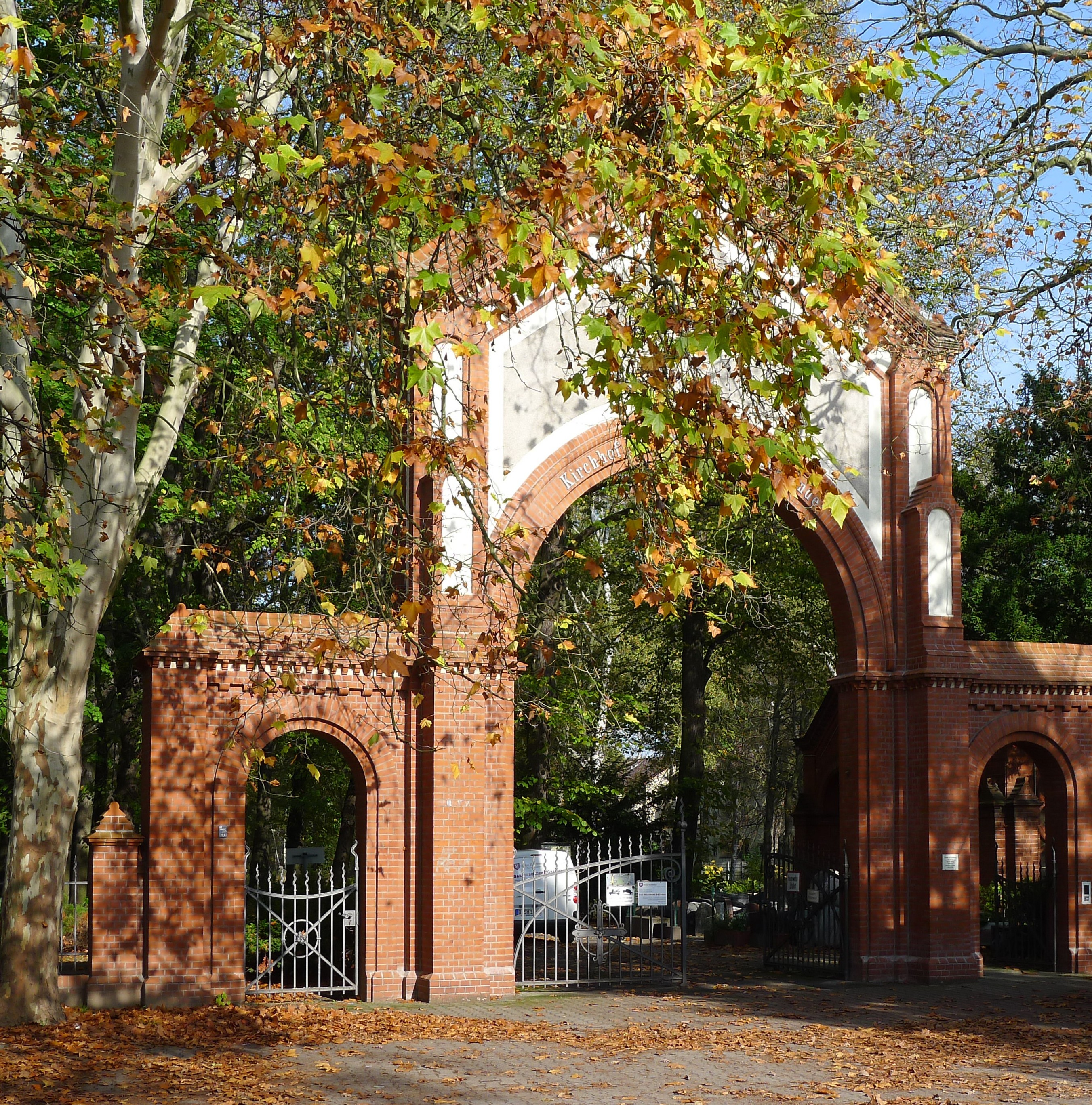 Friedhofstor